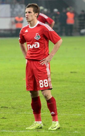 Aleksandr Aliev